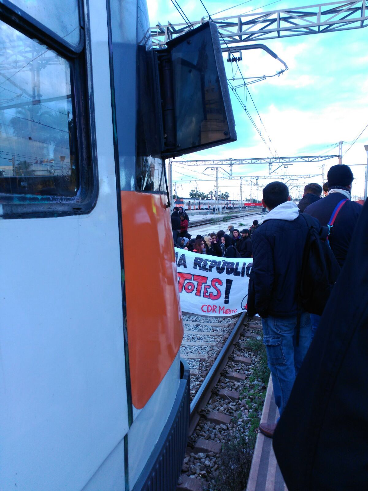 Estació de Mataró durant vaga general novembre 2017